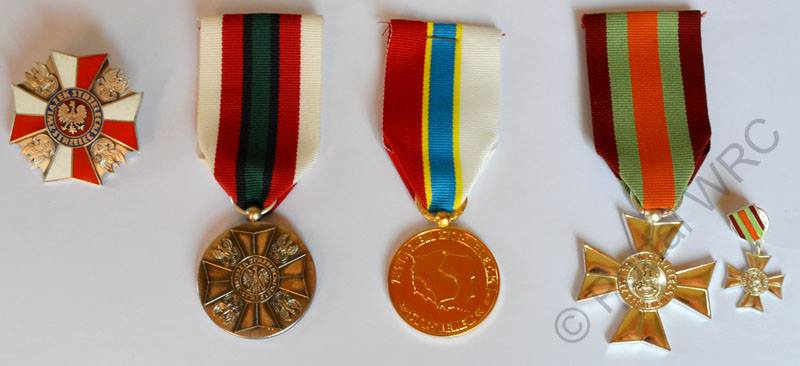 Niektóre medale i odznaczenia ZS"S" RP